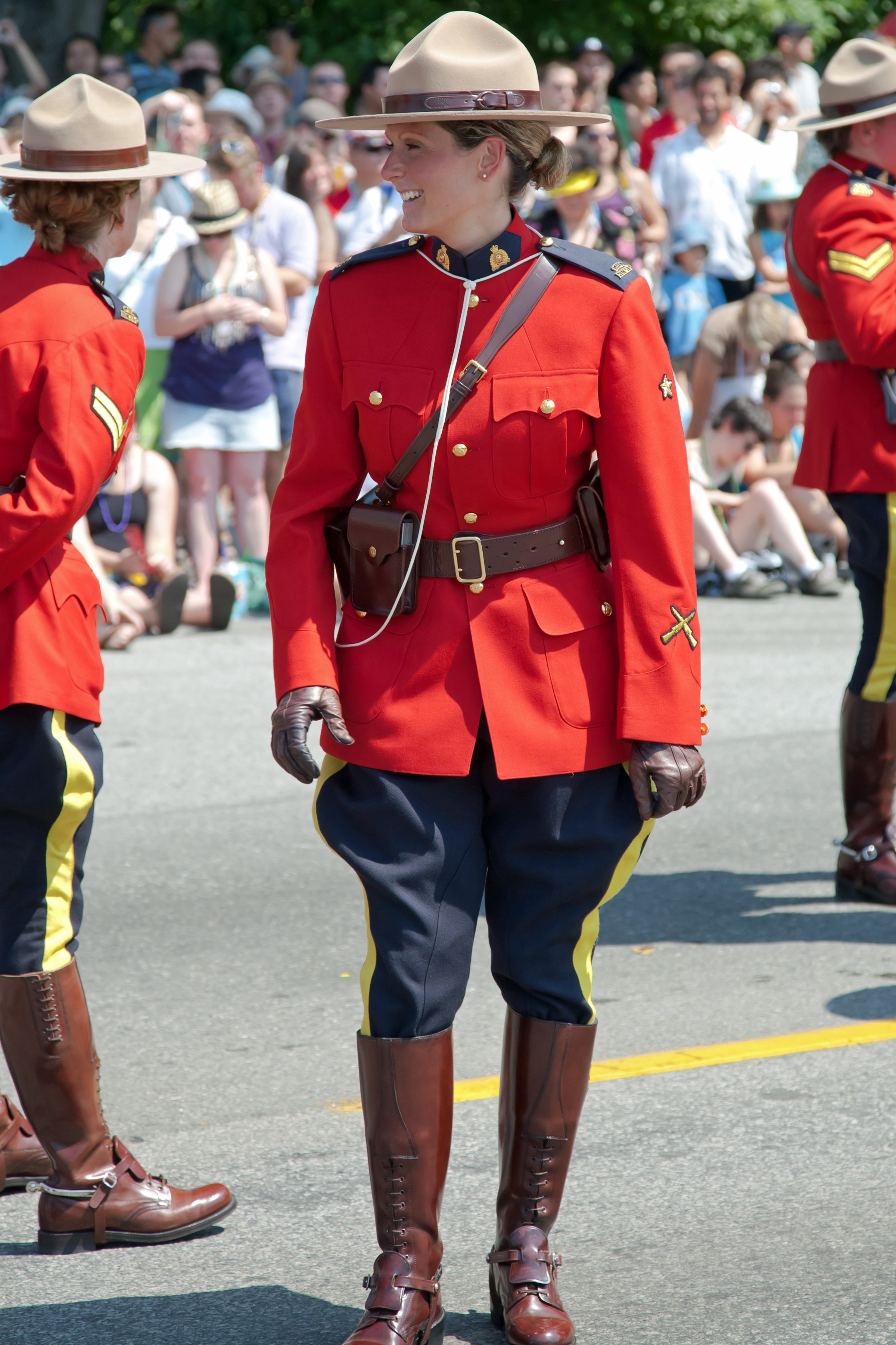 Vancouver Pride 2009